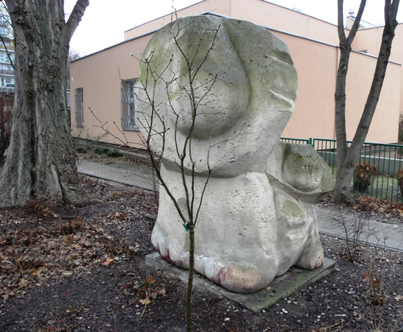 autor: Marek Jerzy Moszyński - polski artysta, rzeźbiarz